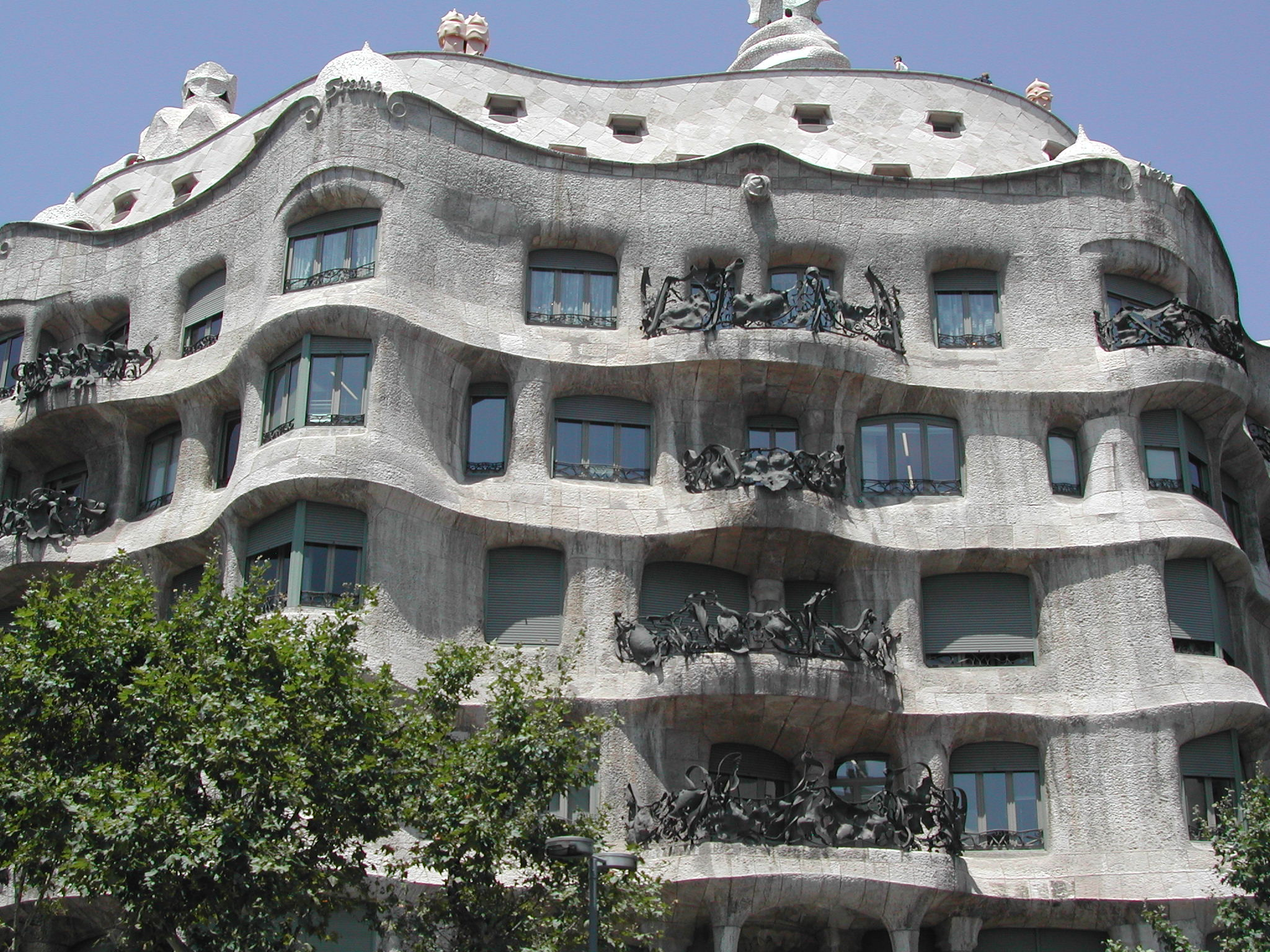 D'Casa Milà zu Barcelona